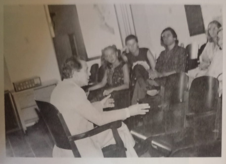 Imagem do então secretario de cultura do Piauí, Manoel Paulo Nunes, no auditório do Museu do Piauí, em reunião com os membros da Associação de Amigos do Museu do Piauí.